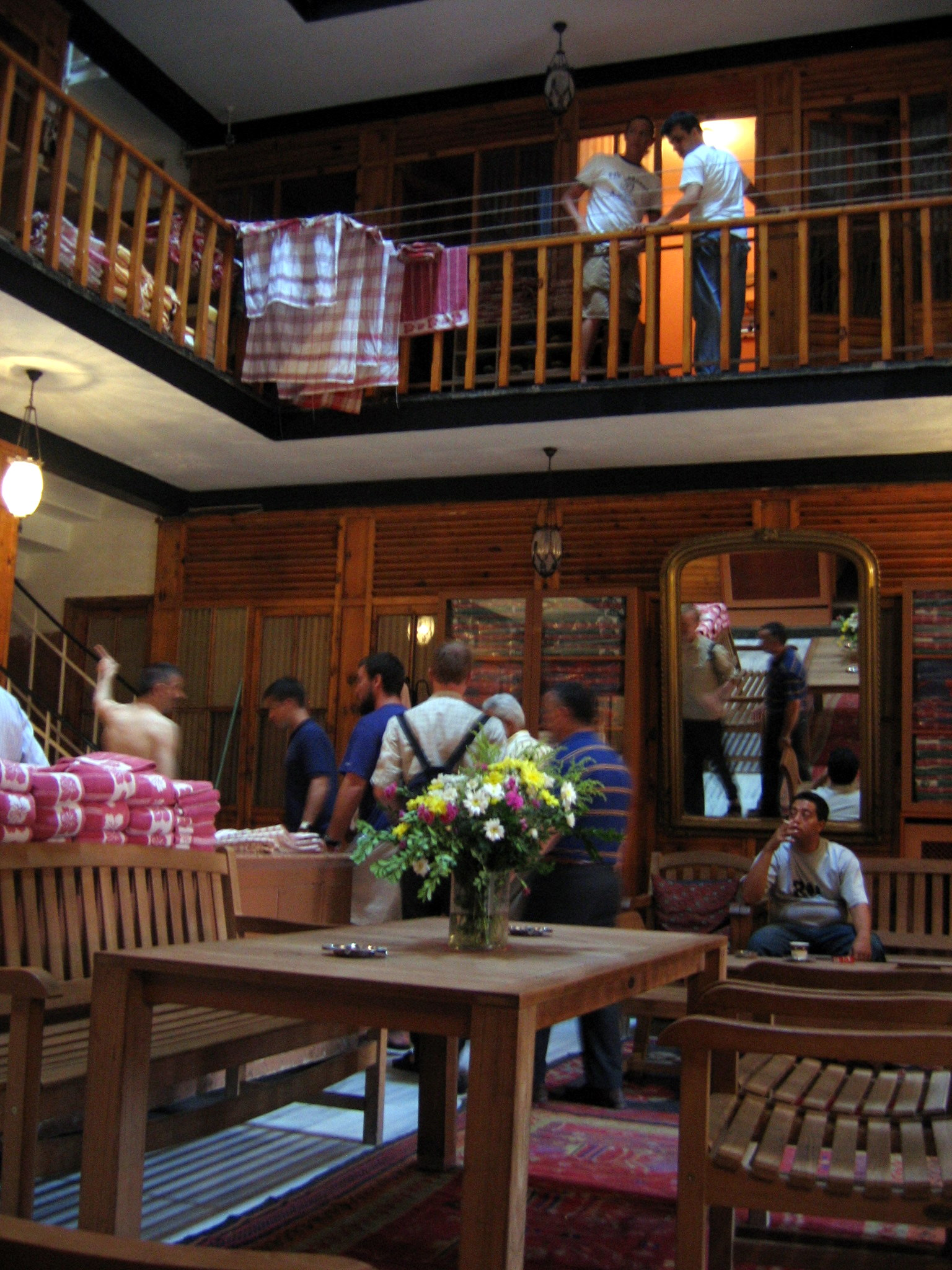 Turkish bath (hamam) in Instanbul (Turkey)